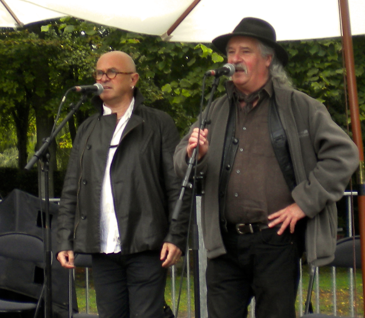 Yann-Fañch Kemener et Erik Marchand au festival d'Île-de-France à Villarceaux le 4 septembre 2011